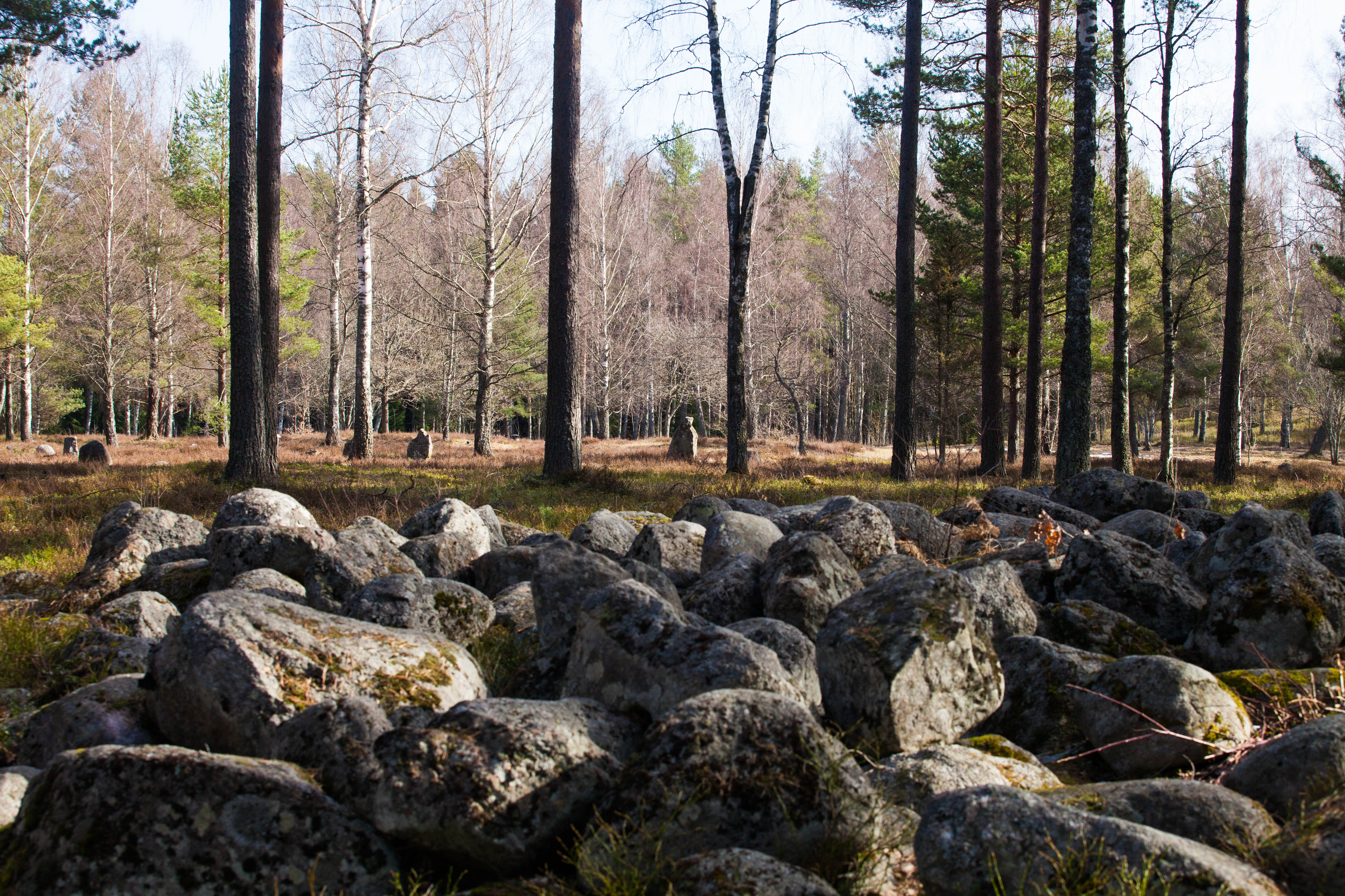 Jordbro gravfält